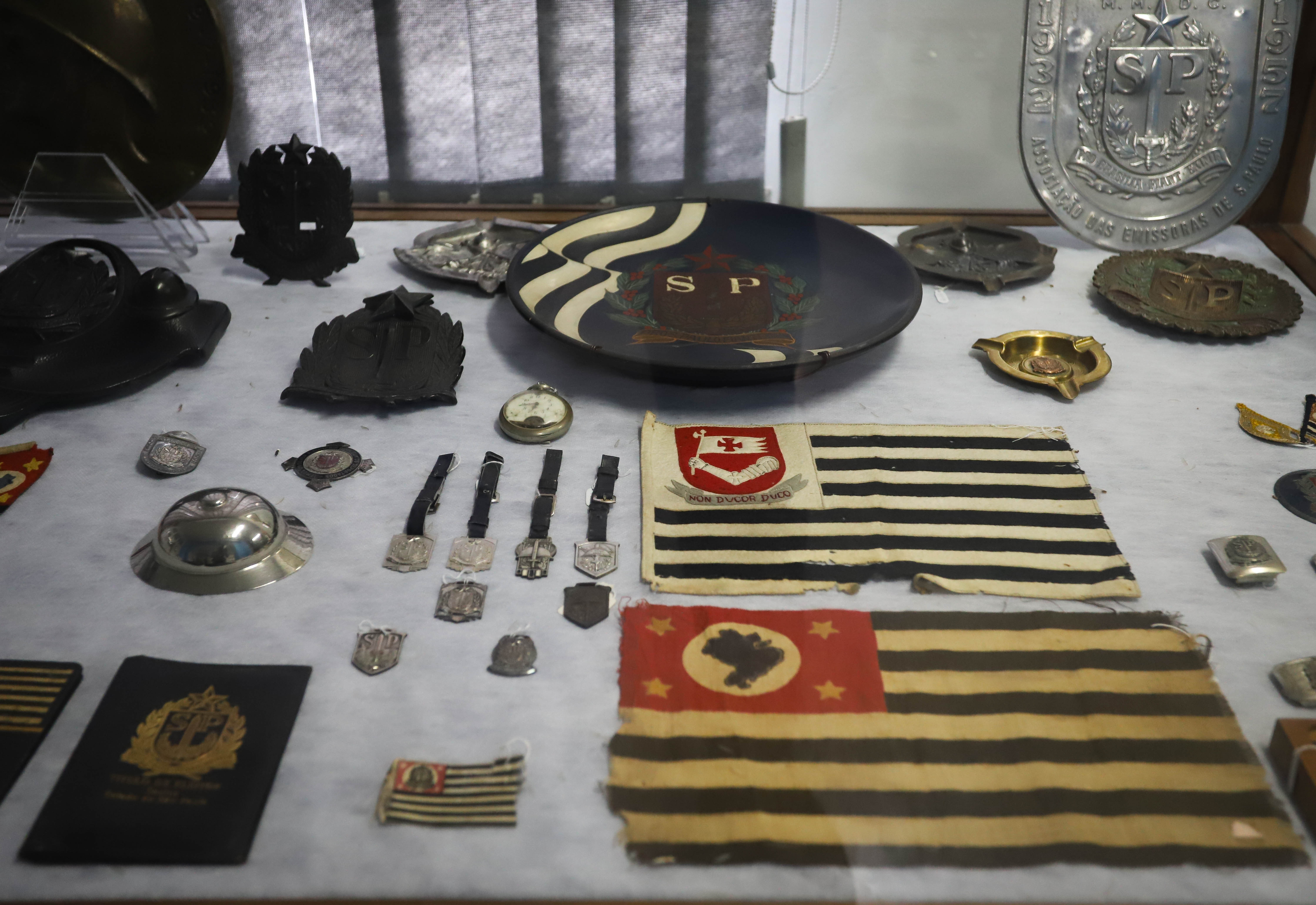 Museu da PM. Local: São Paulo/SP. Data: 16/05/2019. Foto: Governo do Estado de São Paulo